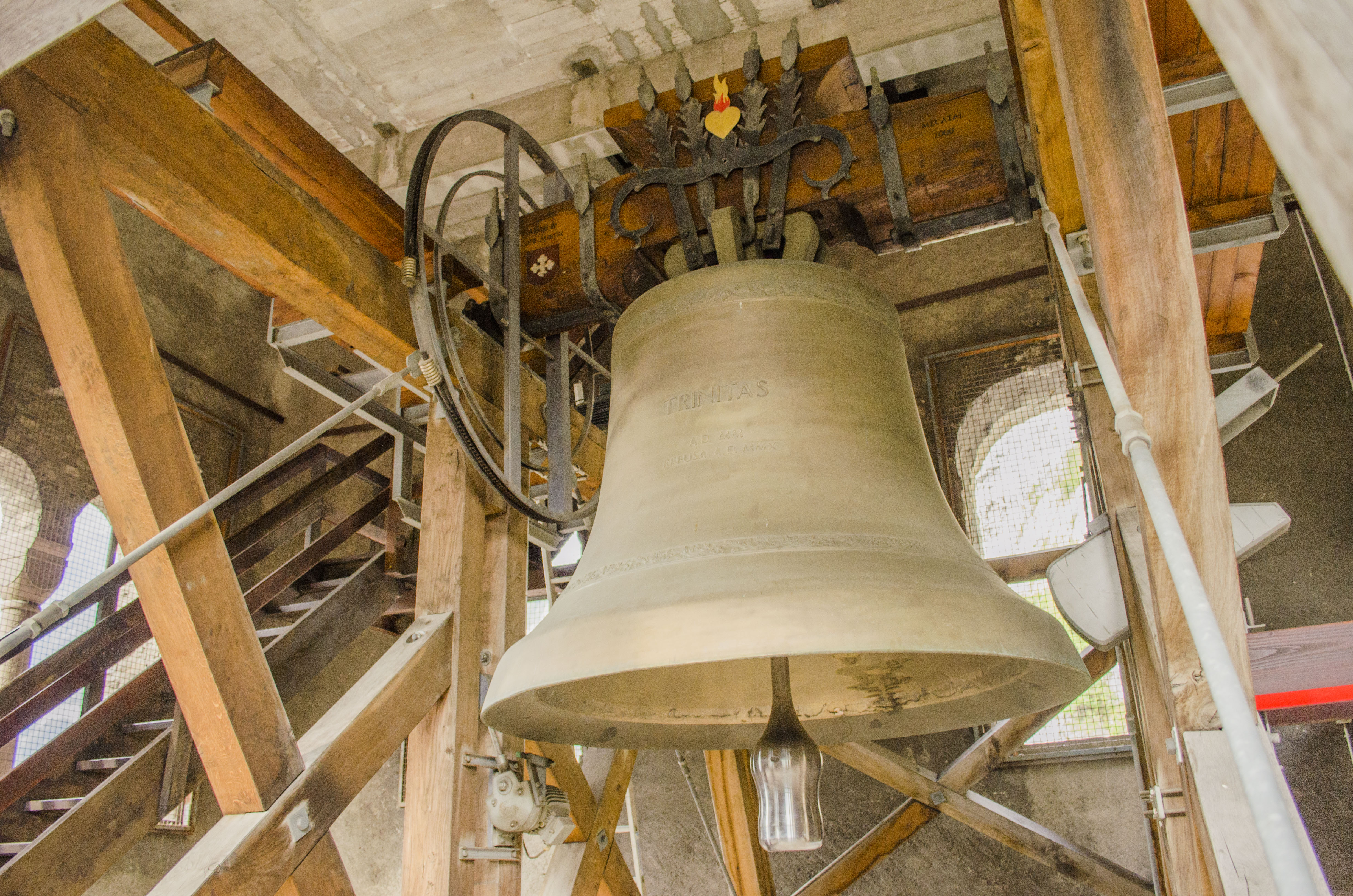 Le bourdon